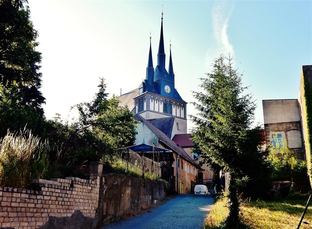 Die Lommatzscher Wenzels-Kirche ,von der Neuen Straße aus gesehen.